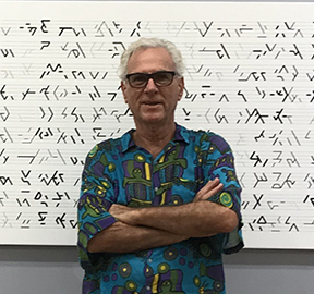 Portrait des Künstlers Manfred Mohr, vor seiner Arbeit, New York, im September 2019